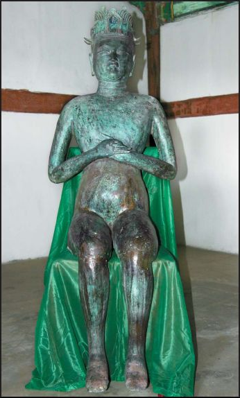 고려태조 왕건의 나체 좌상